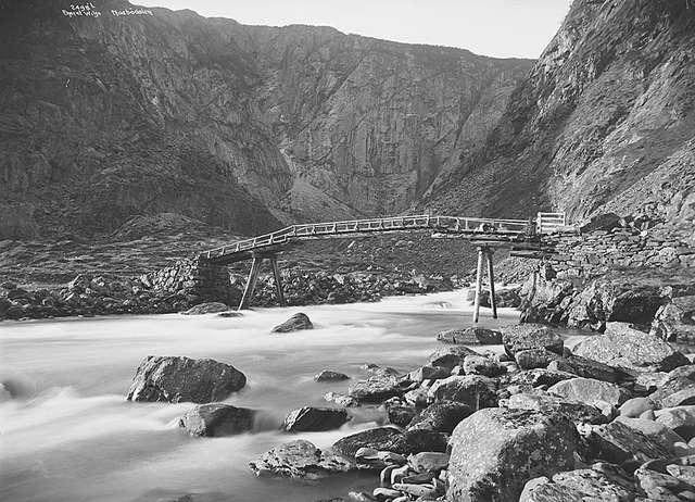 Bru i Måbødalen